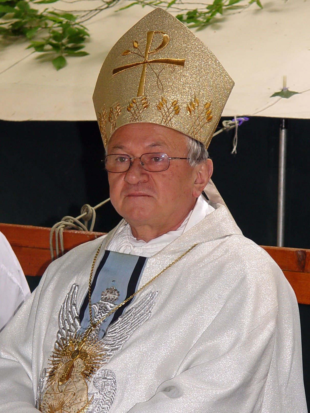 KS. BISKUP ZYGMUNT ZIMOWSKI, ORDYNARIUSZ DIECEZJI RADOMSKIEJ, MSZA ŚWIĘTA, WYKUS, 14.06.2008